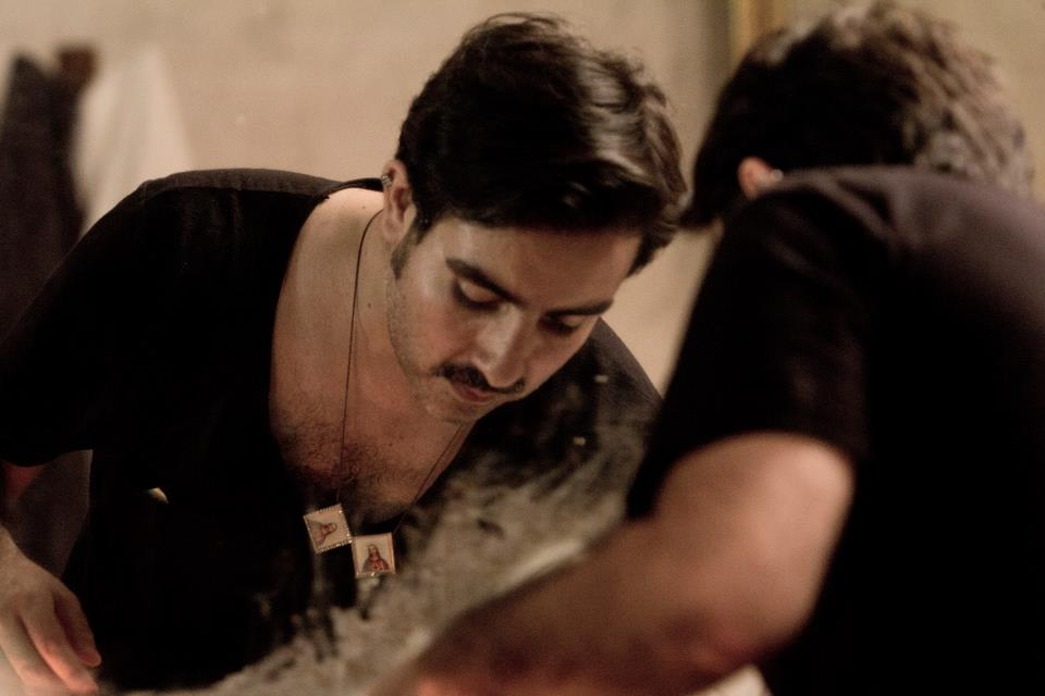 Reconocido director de arte, ganador de premio Pedro Sienna, año 2006, 2010 y 2013.